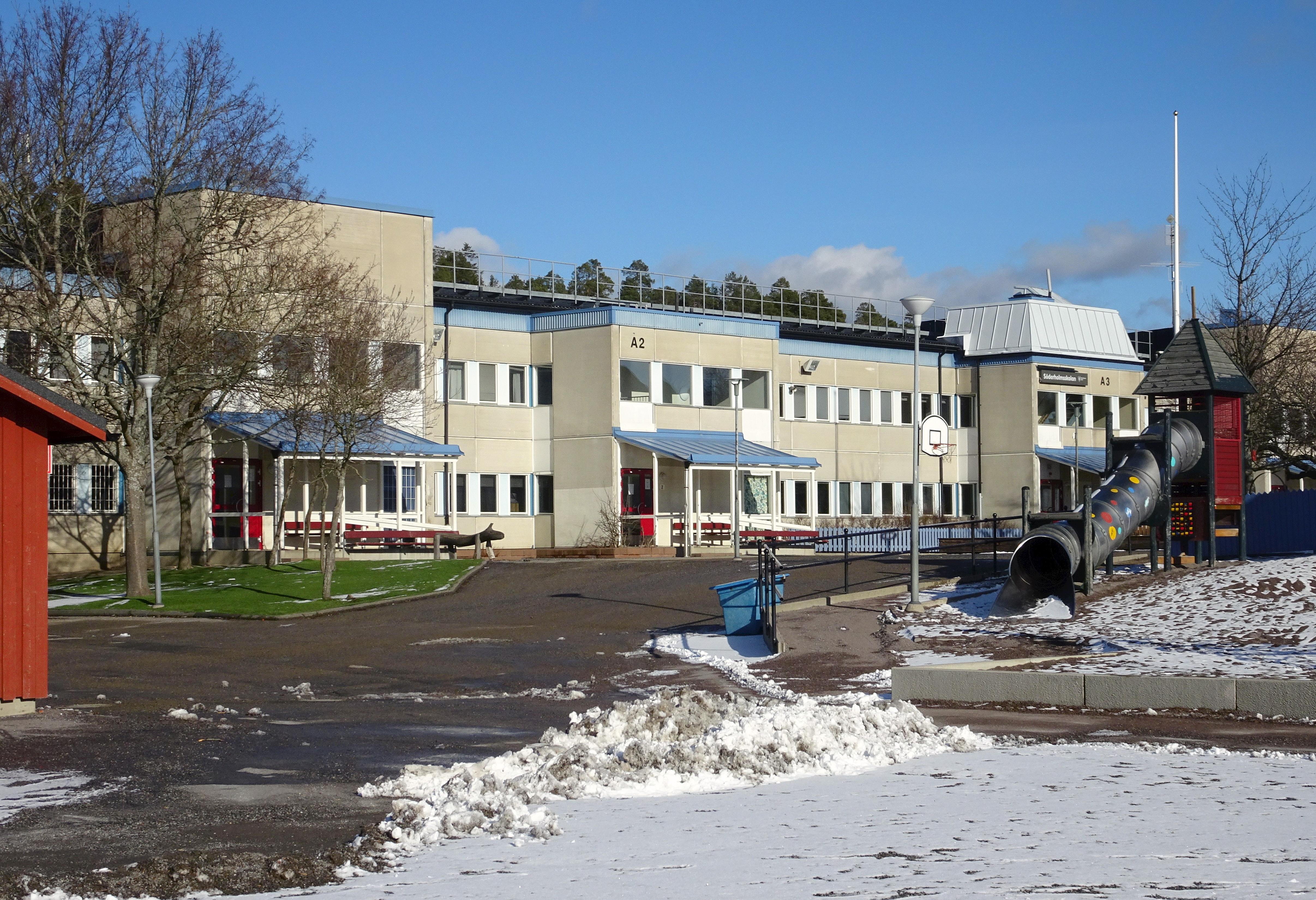 Söderholmsskolan, Vårberg, Våruddsringen 202, arkitekt Bengt Hidemark & Gösta Danielsson (1971)